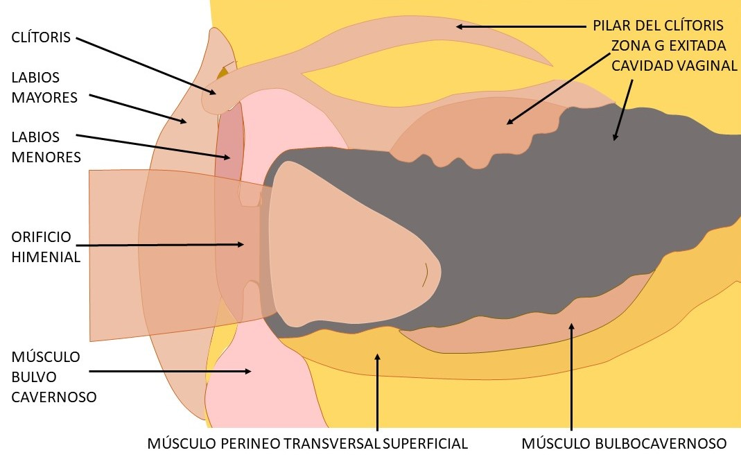 Como un resabio ancestral comparable a otros mamíferos especialmente felinos el glande descubierto presenta un efecto de cierre interno en el orificio himenial, vésae lo complemeterio de las formas. Se dice que esto obedece a obligar al semen a permanecer más tiempo dentro de la vagina y evitar competencia de otros machos interesados por una hembra en celo.